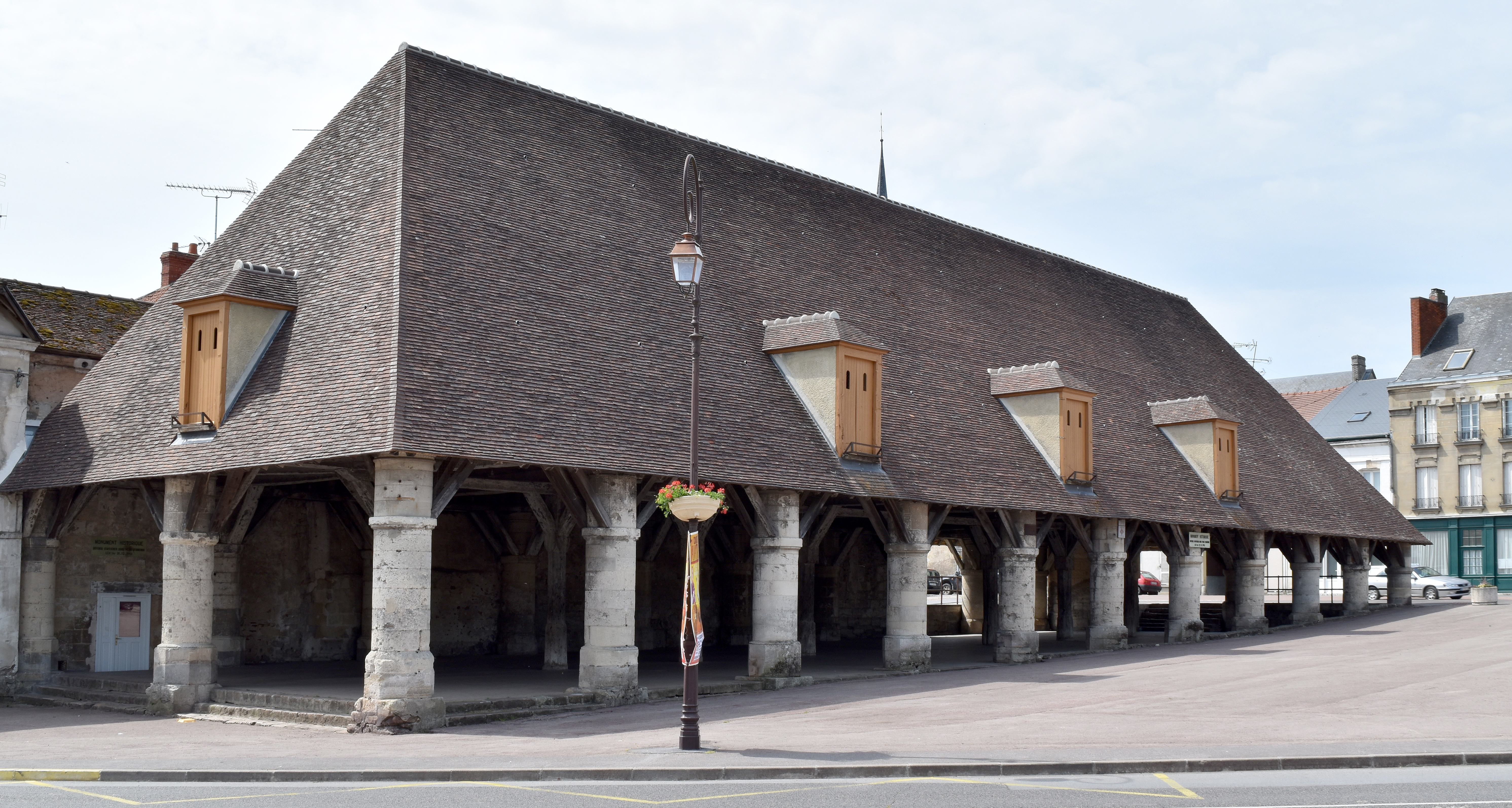 Halles de Fere en Tardenois, Aisne, France